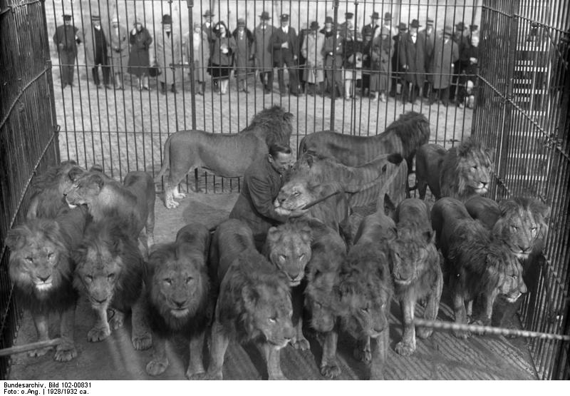 Ein Meister der Löwendressur ! Kapitän Schneider, inmitten von ca. 40 Löwen. Furchtlos bewegt sich der Meisterdompteur in dem Käfig der Raubtiere. [Text Bild 102-16928]